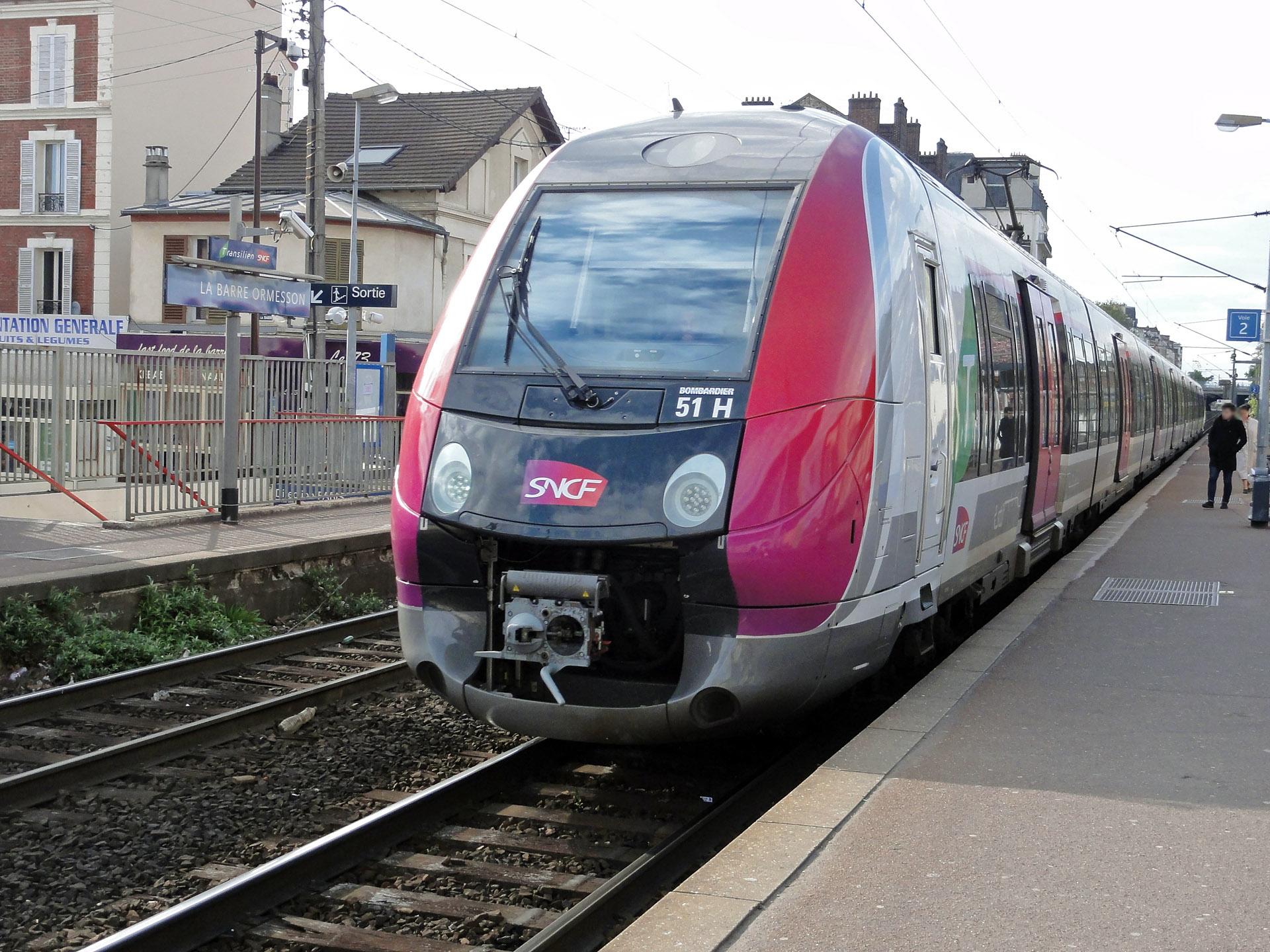 Rame Z 50000 entrant en gare de La Barre - Ormesson en direction de Paris-Nord, à Deuil-la-Barre, Val-d'Oise, France.